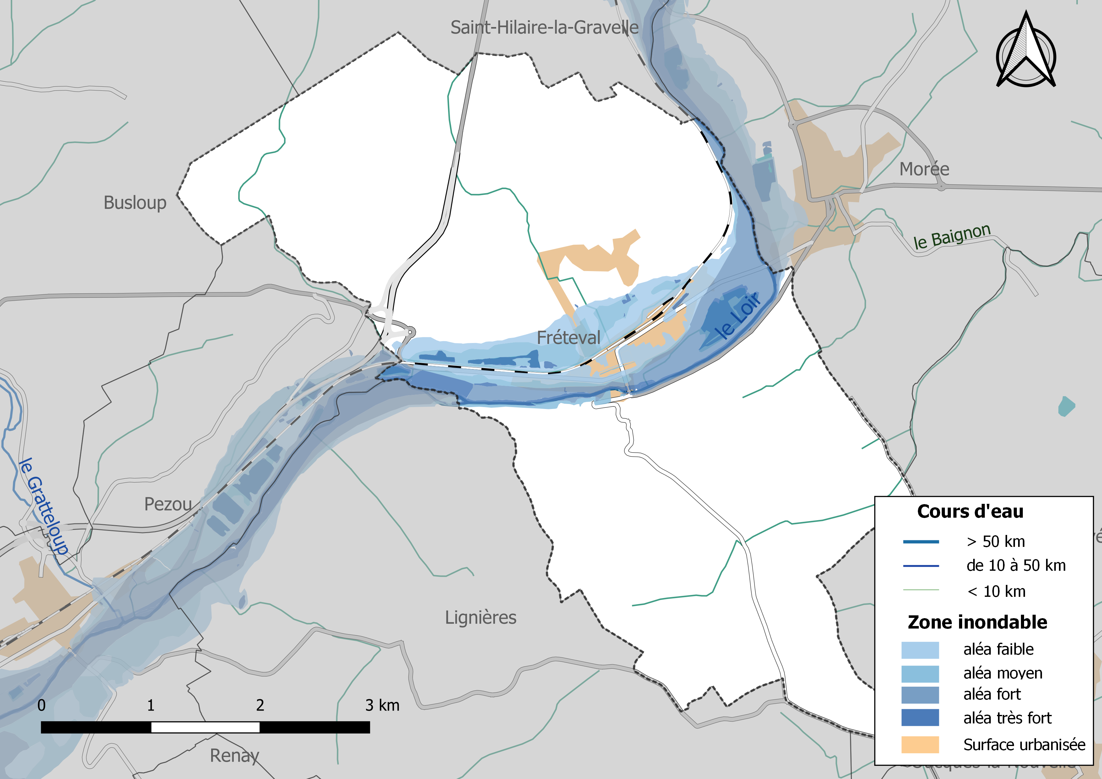 Carte des zones inondables de la commune de Fréteval (France).